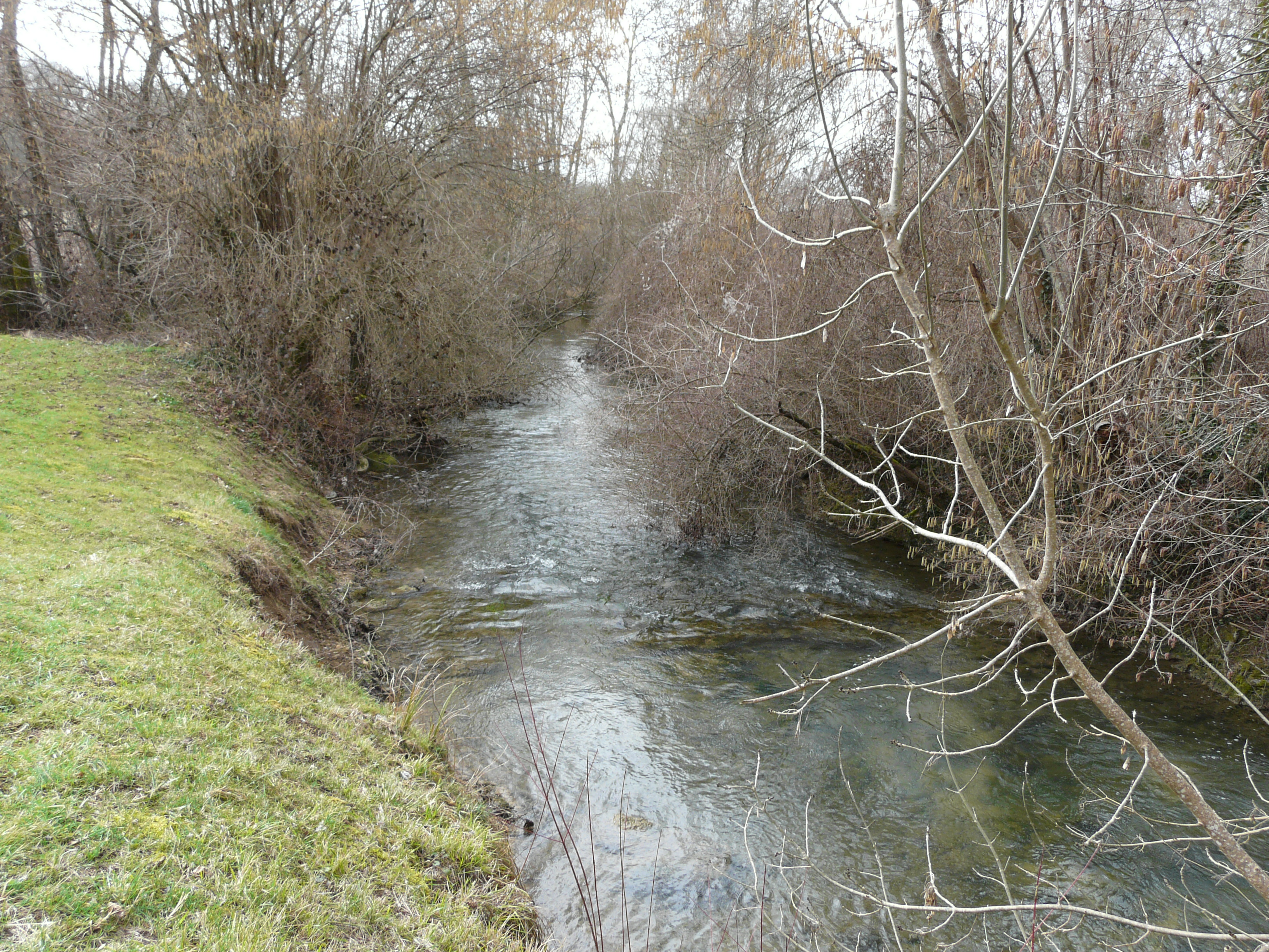 Le Caudeau entre Creysse (à gauche) et Lembras (à droite), Dordogne, France. Pont de la route des Pélissoux : vue prise en direction de l'amont.